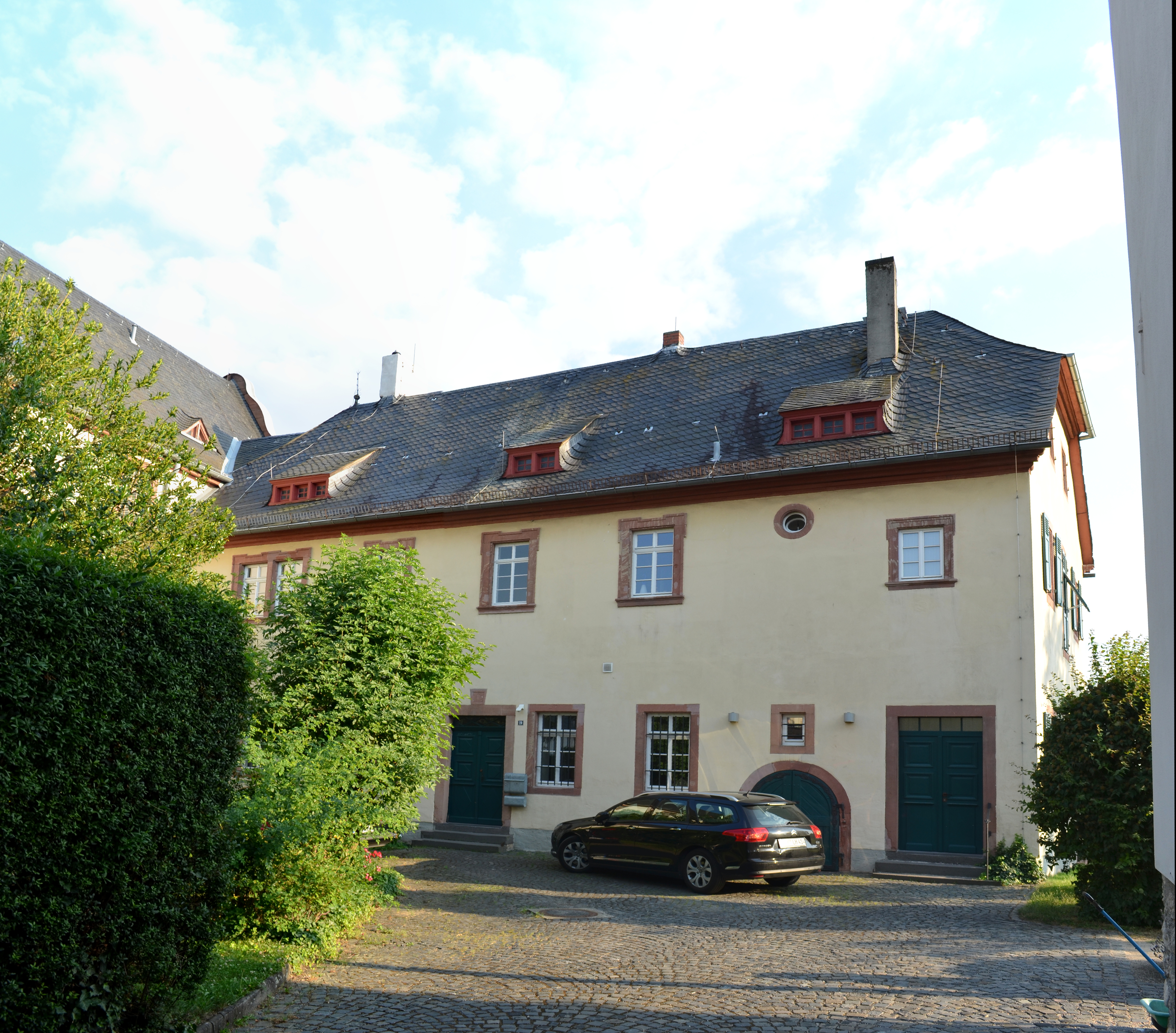 Hochheim, Kirchstraße 19